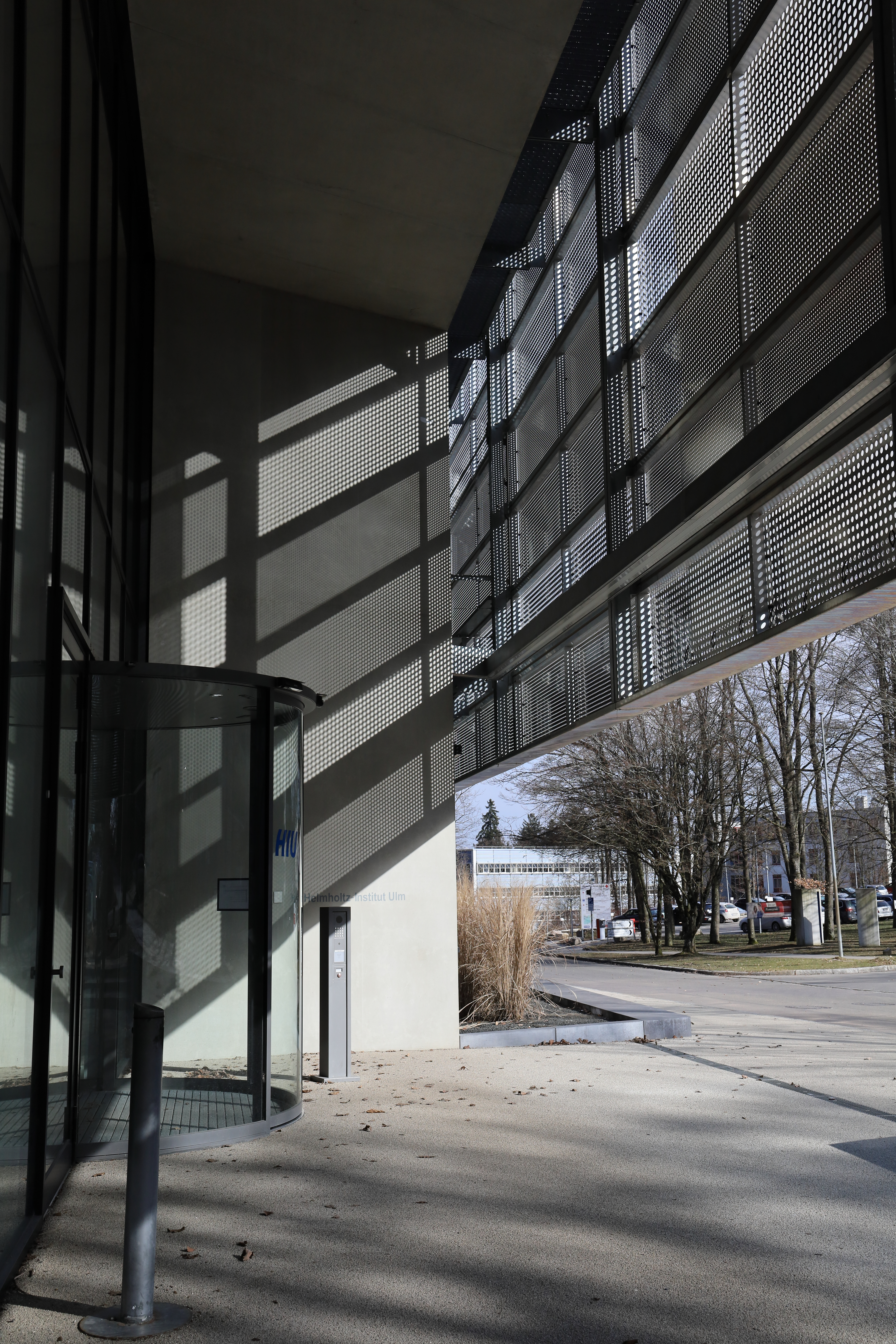 Ulm, Baden-Württemberg, Germany